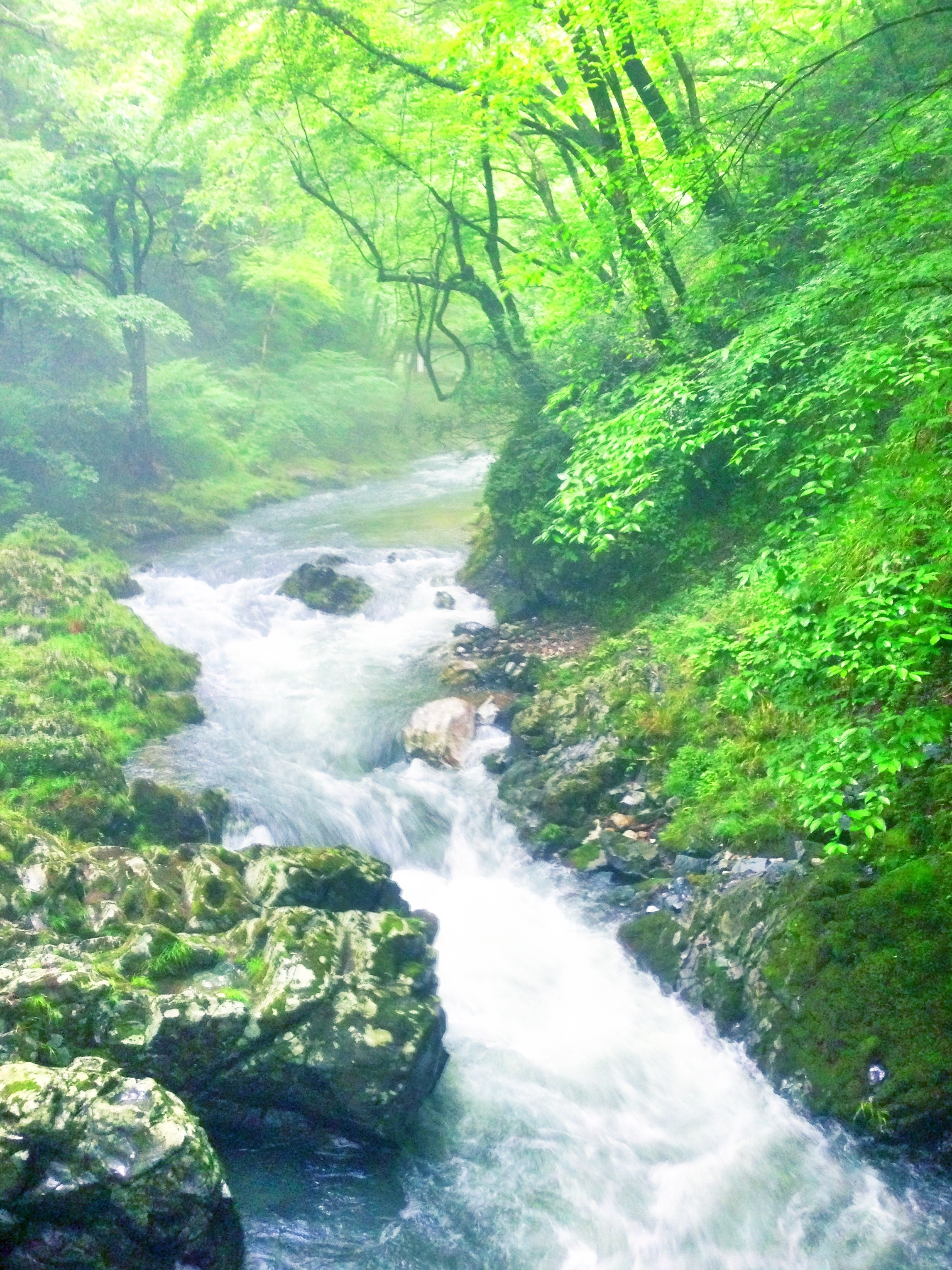 広島県東部の帝釈川。白雲洞付近の遊歩道より撮影